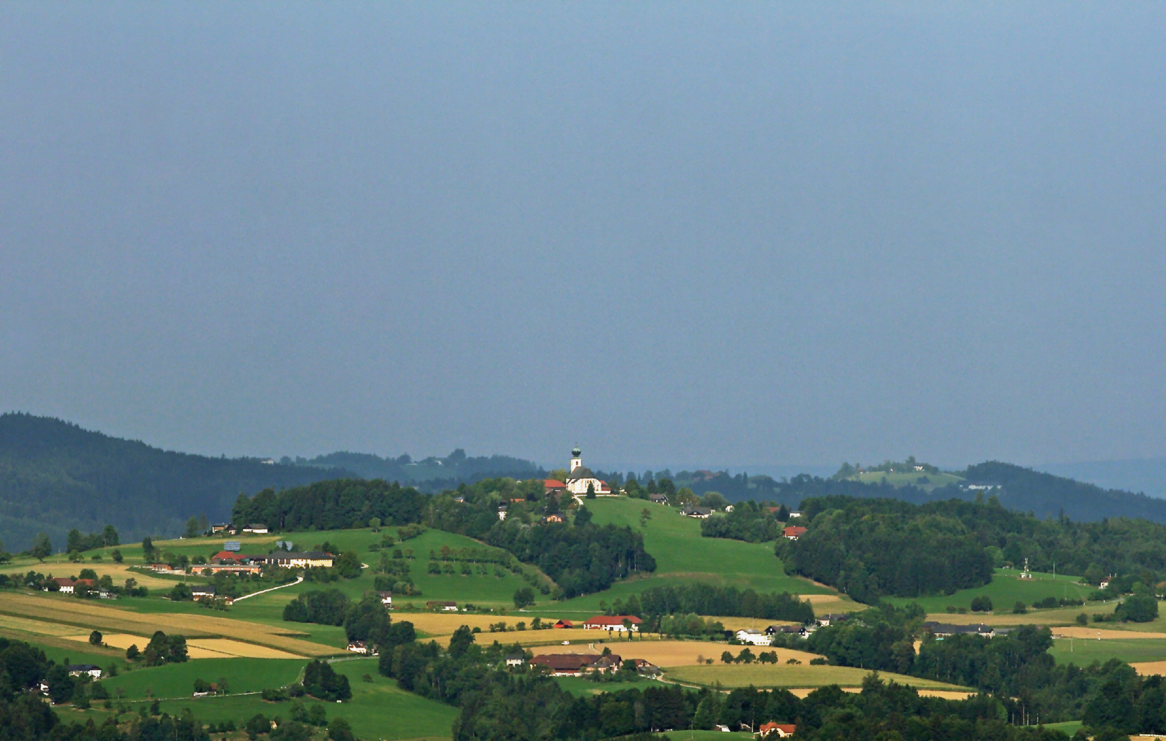 Der Magdalenaberg in Pettenbach mit der Pfarrkirche hl. Magdalena. Blick von Oberschlierbach (Schiefer Straße)